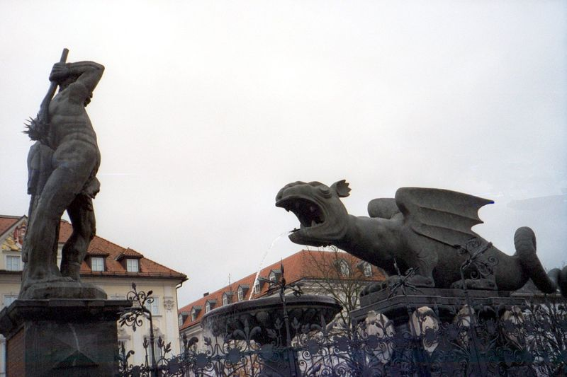 Lindwurm Brunnen, Klagenfurt (Austria). 21:10, 16 April 2006 Asterion 1536x1024 (265041 bytes) (Lindwurm Brunnen, Klagenfurt (Austria). Photo by ~~~)